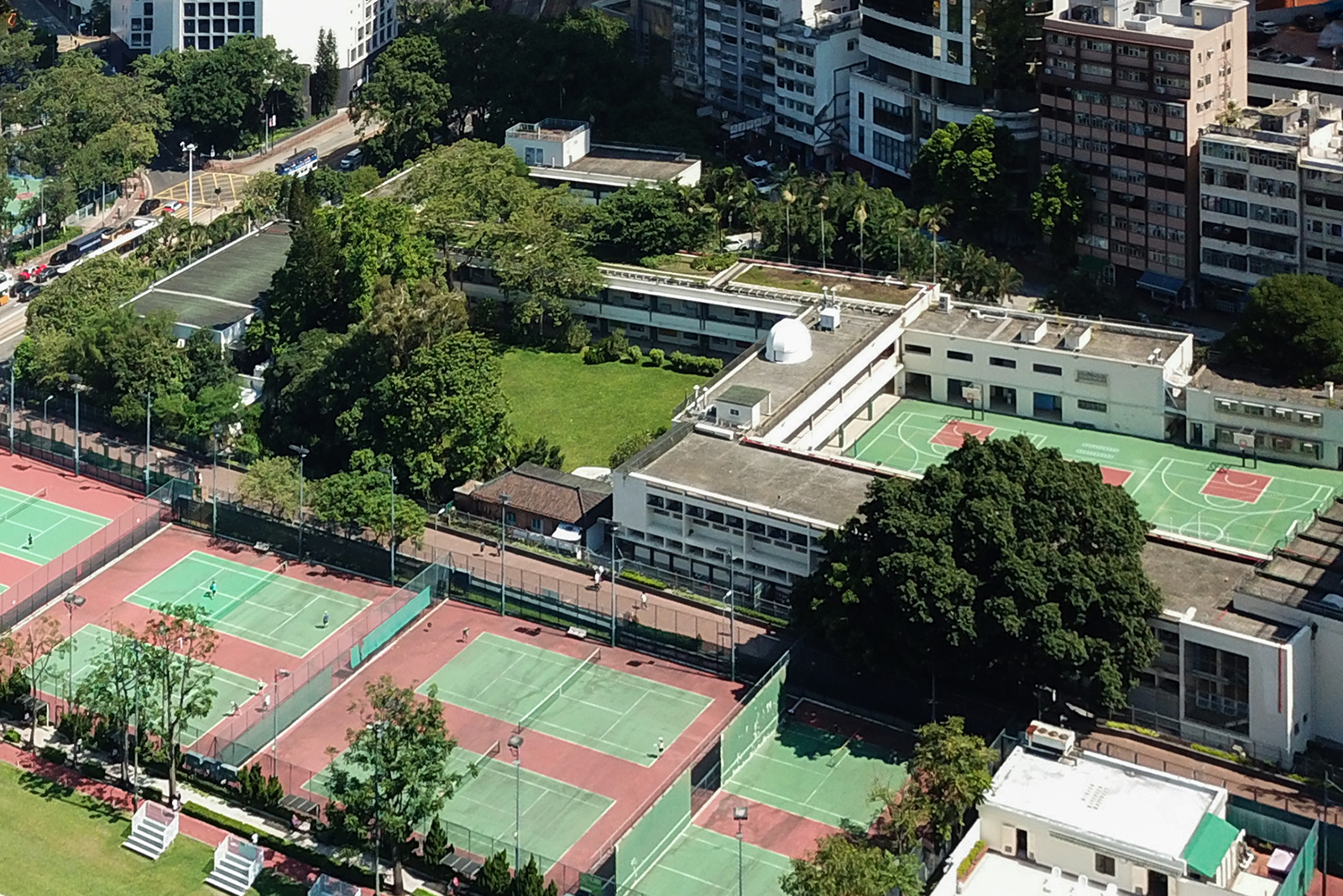 Queen's College